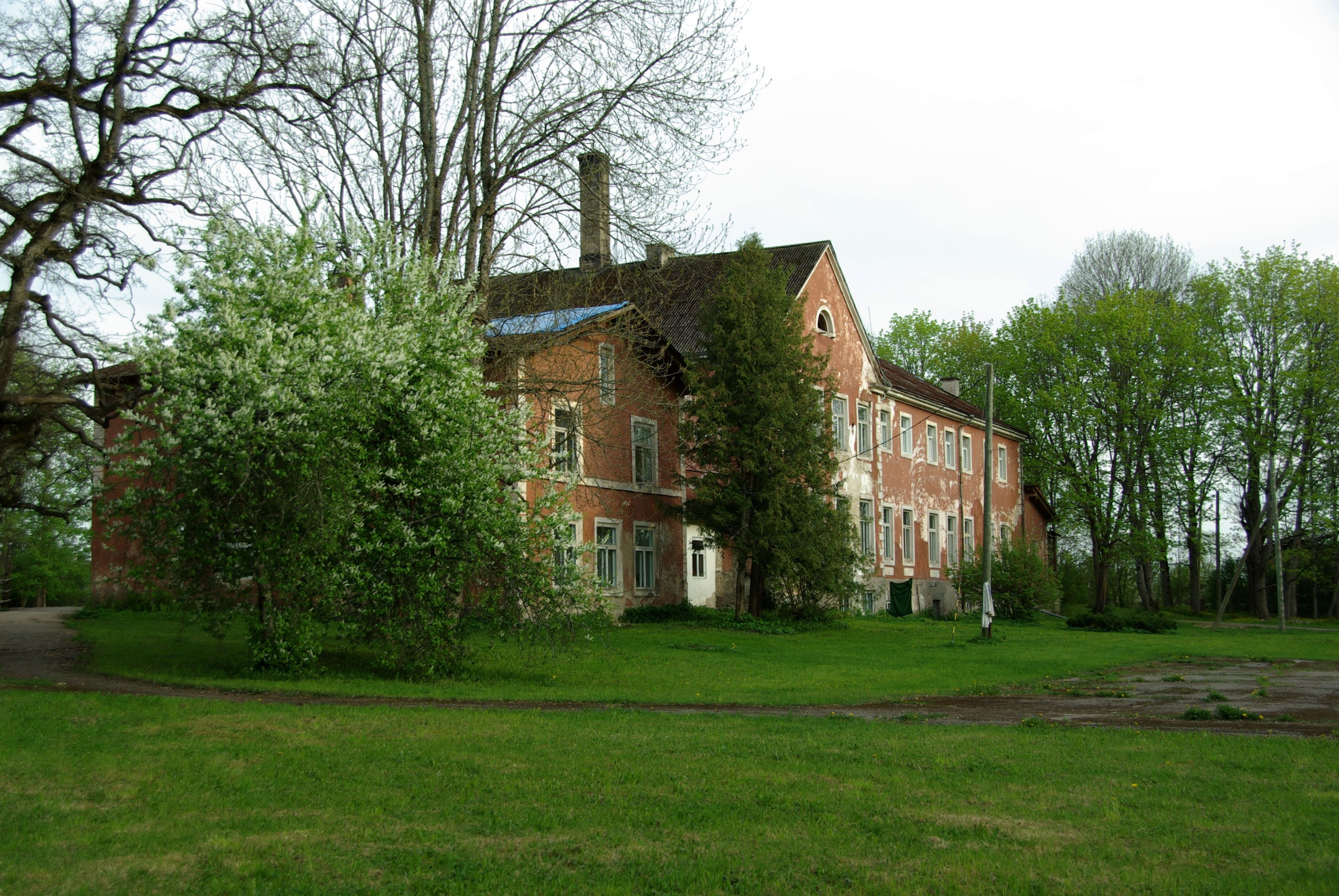 mõis Roosna-Alliku vallas Järva maakonnas